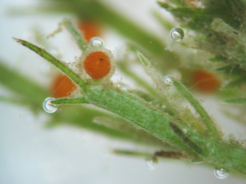 Vielstachelige Armleuchteralge Chara polyacantha, Habitus, Müritz-Gebiet